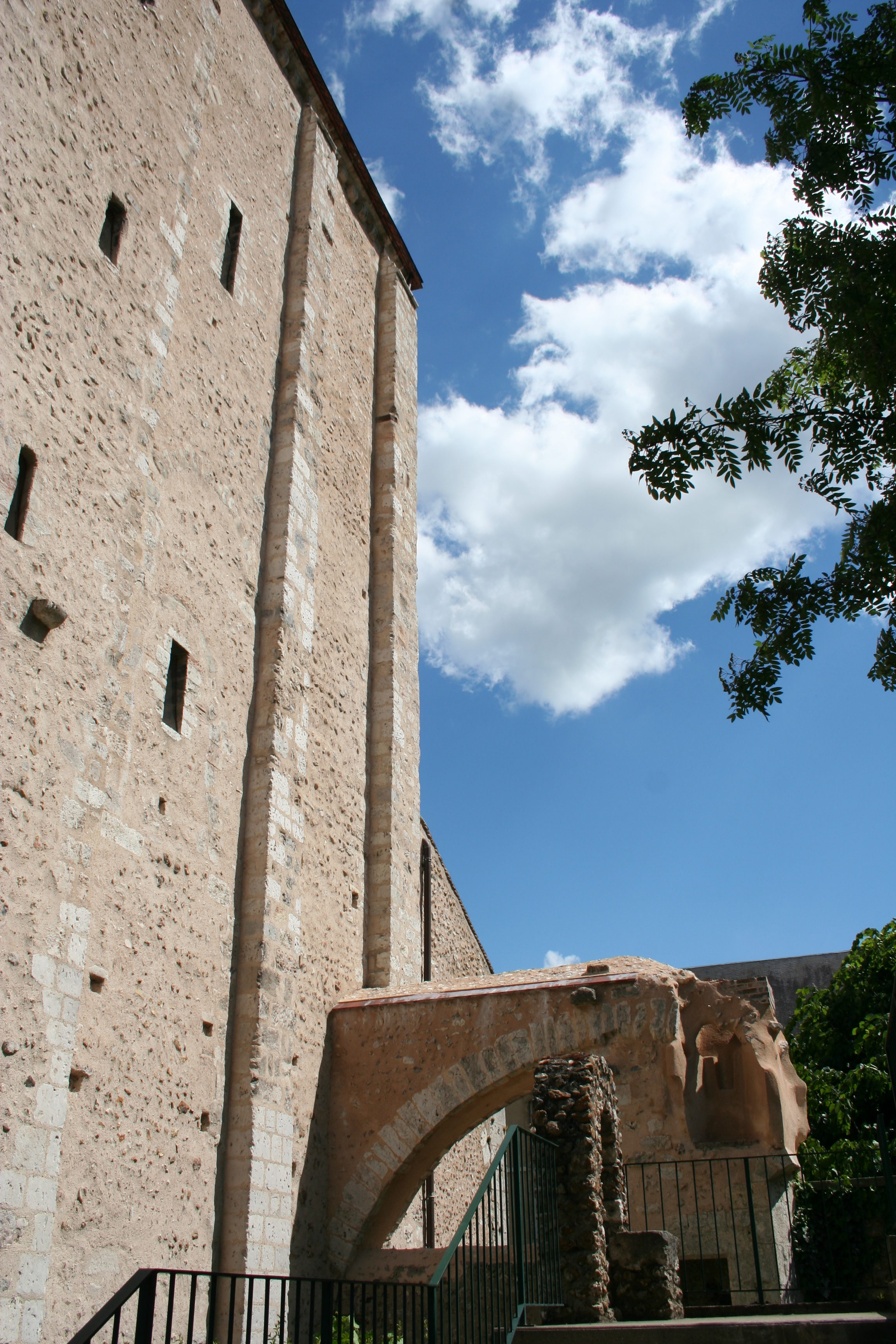 Vue extérieure de la tour ouest de l'église Saint-Pierre de Chartres, France.